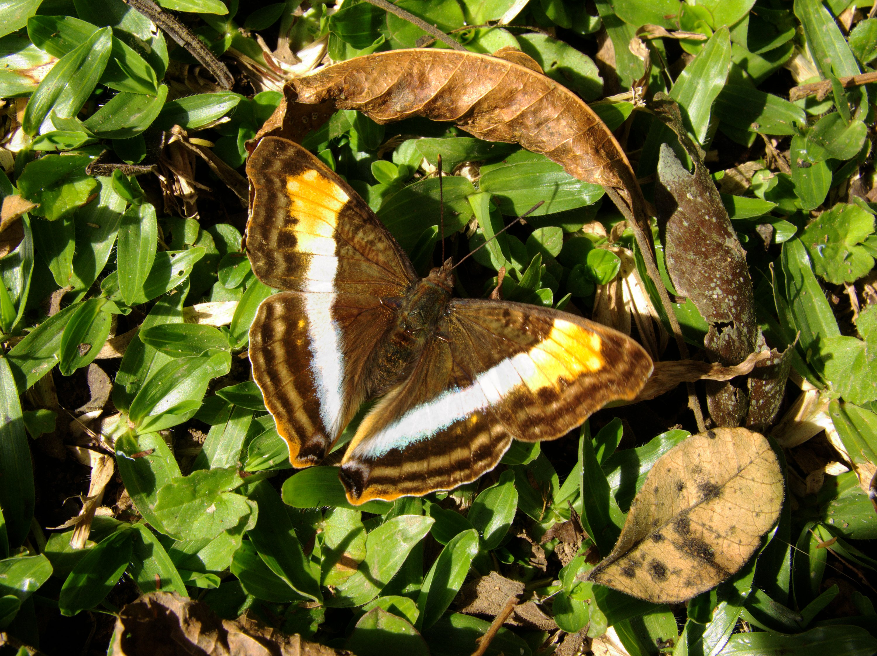 Doxocopa laurentia (Nymphalidae, Apaturinae), Curitiba, Brasil. Female.